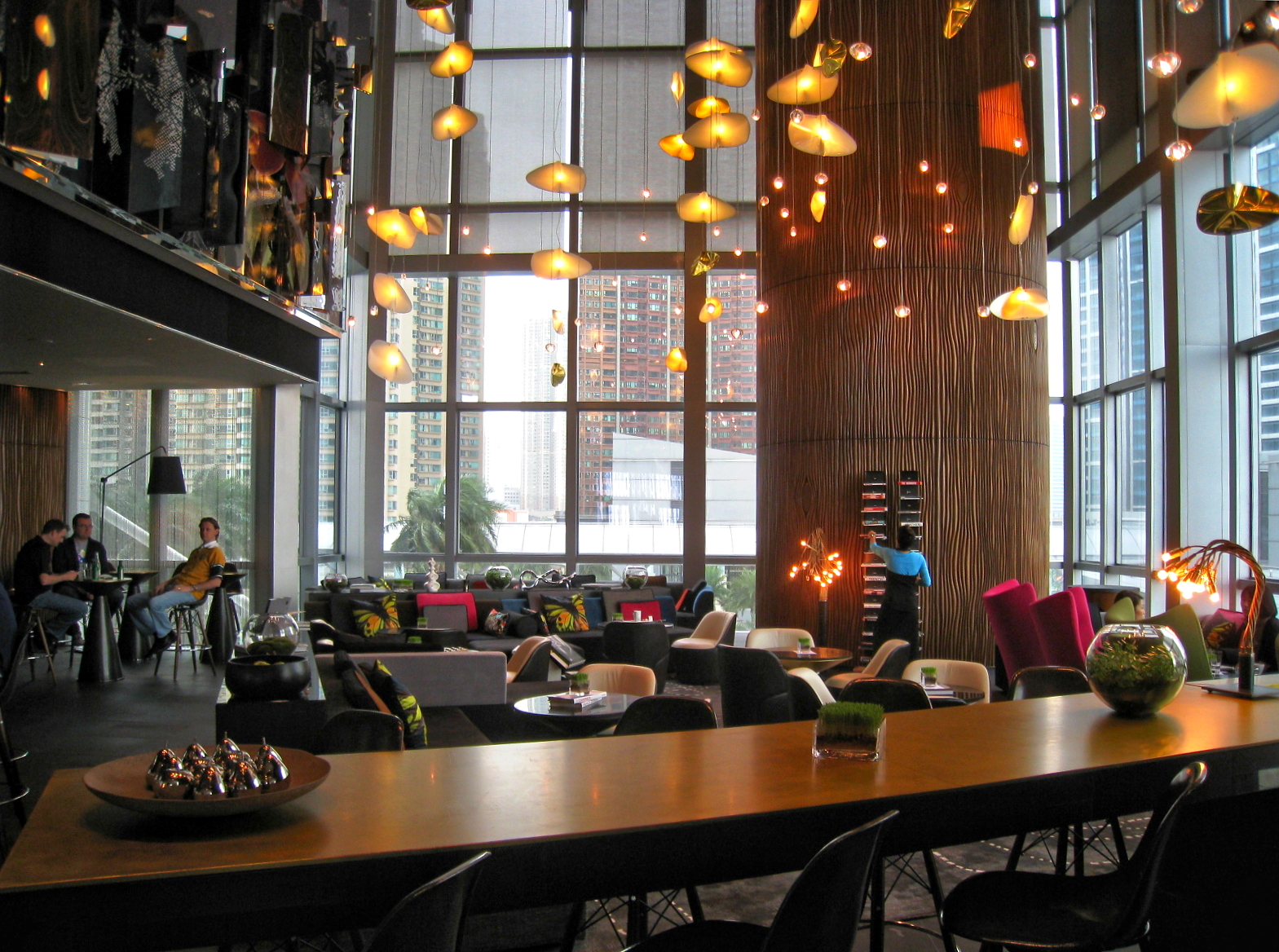 W Hotel Hong Kong 香港W酒店